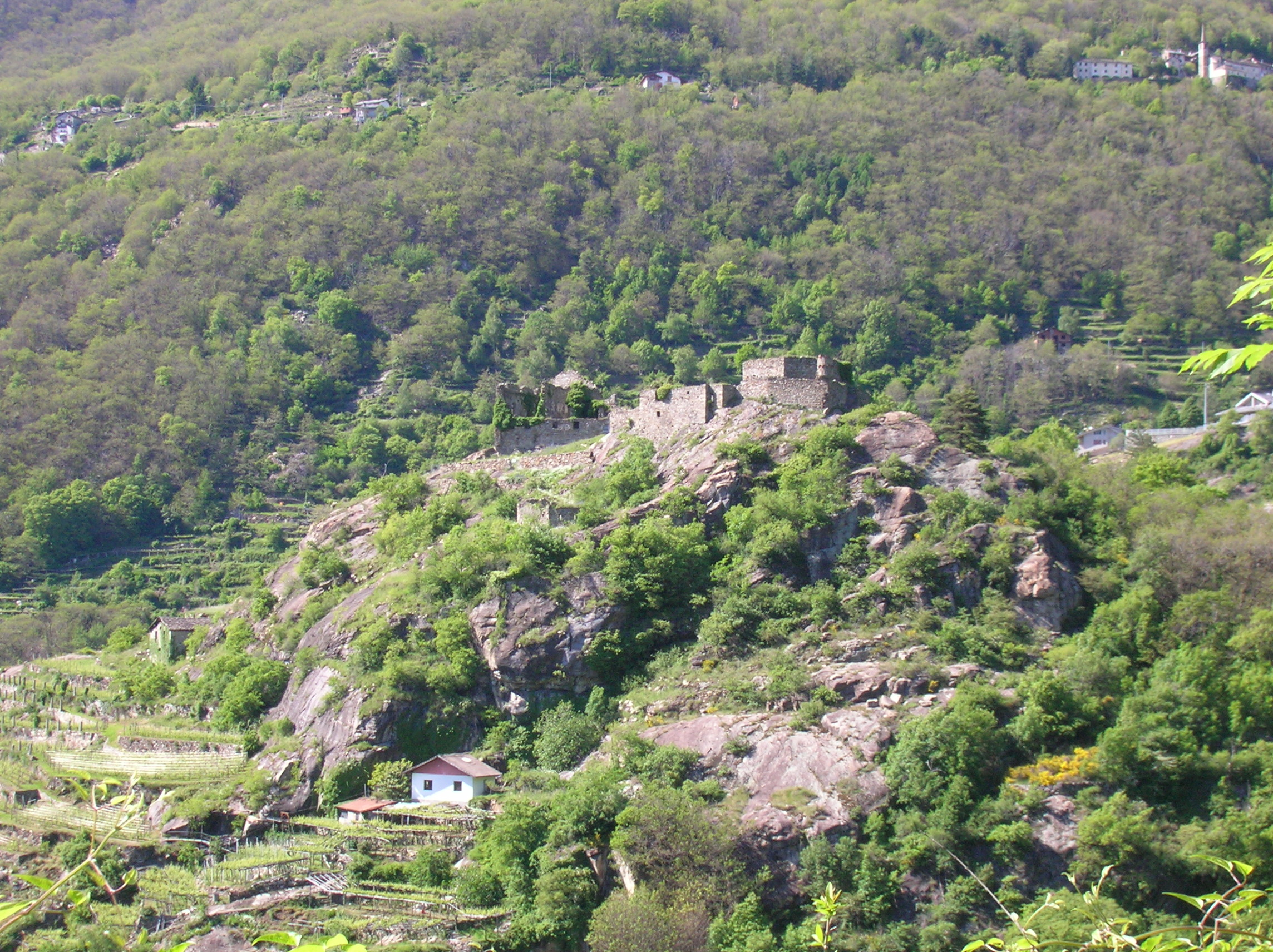 Castellaccio di Pont-Saint-Martin, Valle d'Aosta, Italia.